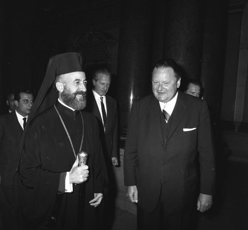 Staatsbesuch Zypern Eintragung in das Goldene Buch im Rathaus Hamburg